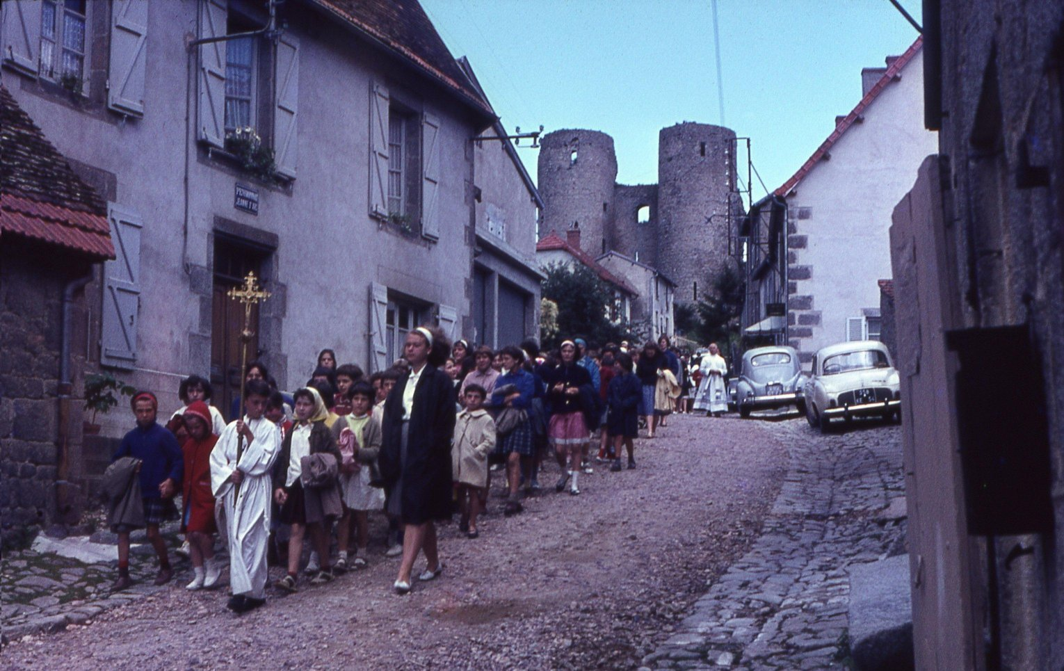 Procession dans la première moitié des années 1960 à Crocq (Creuse, France).